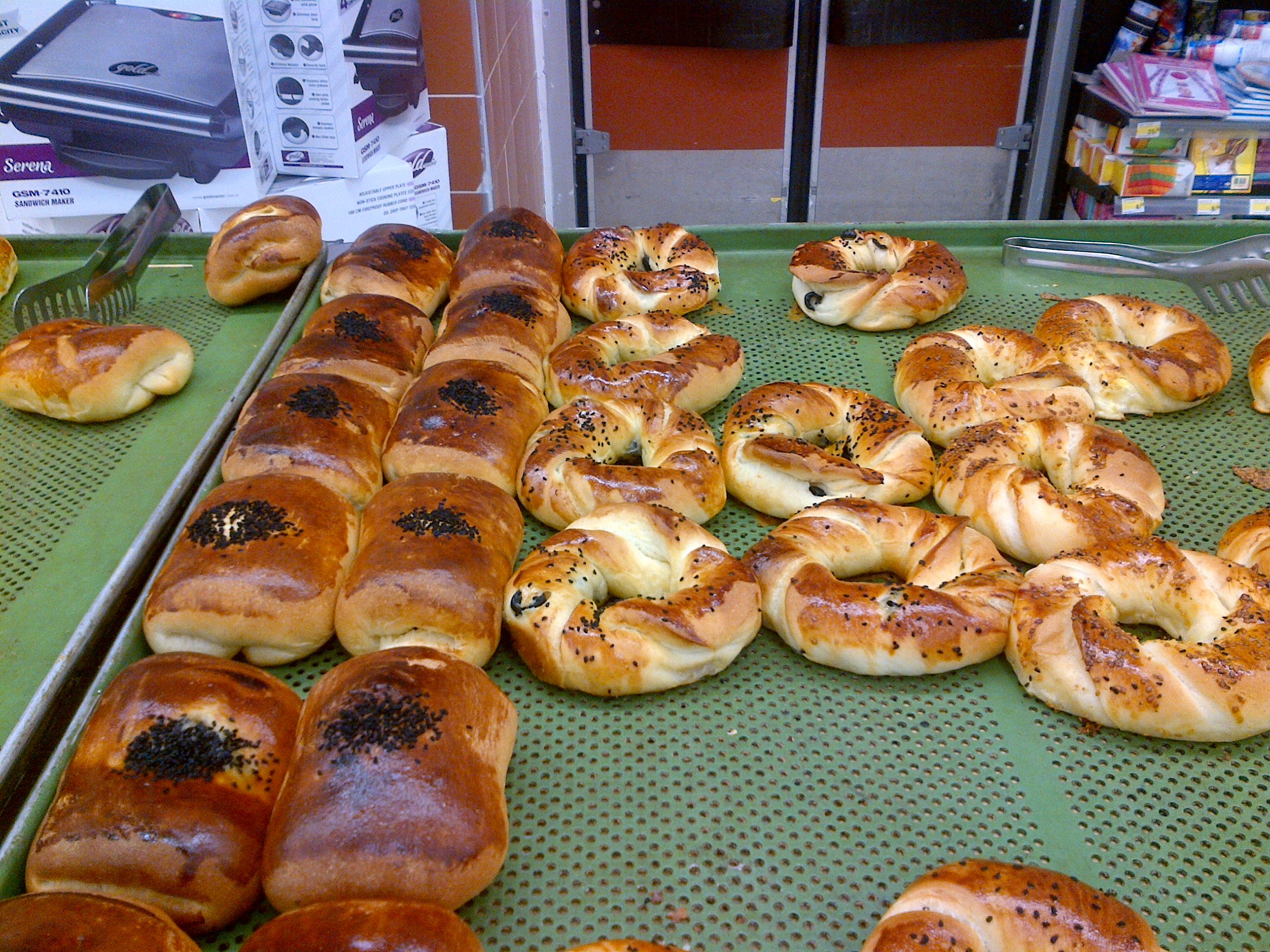 Poğaças a la izquierda de la bandeja, y "açma"s (las roscas) en un supermercado turco.